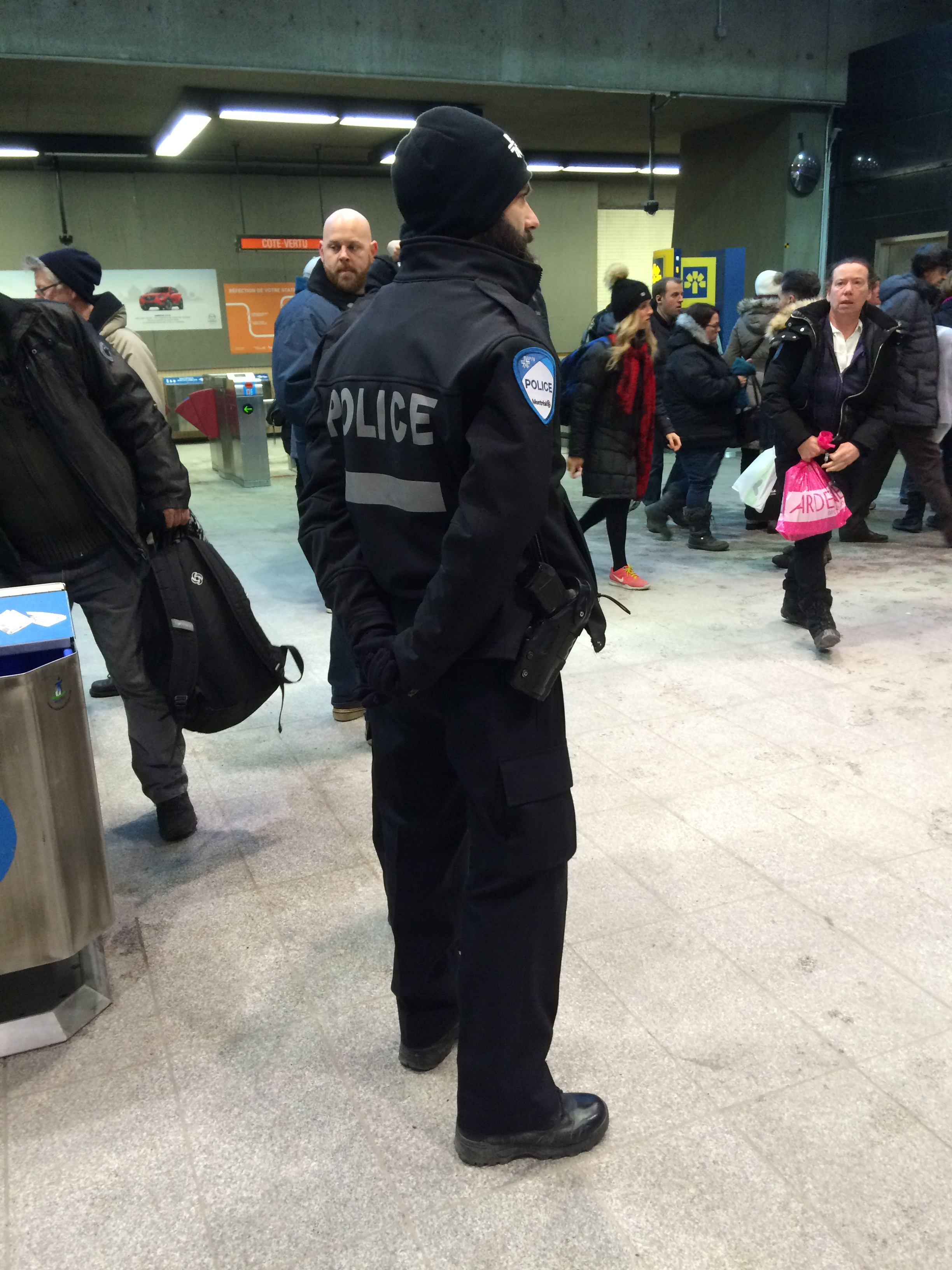 SPVM